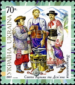 Марка з серії "Народний одяг України" 2007 Закарпаття. Кузьми та Дем'яна